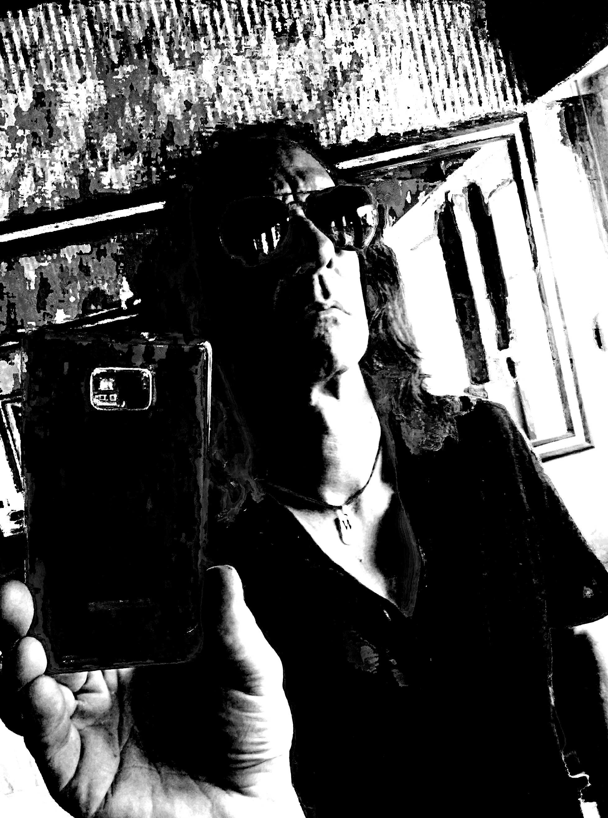 Selbsportrait M.W.Wild 2017, künstlerisch bearbeitet vom Autor M.W.Wild selbst.